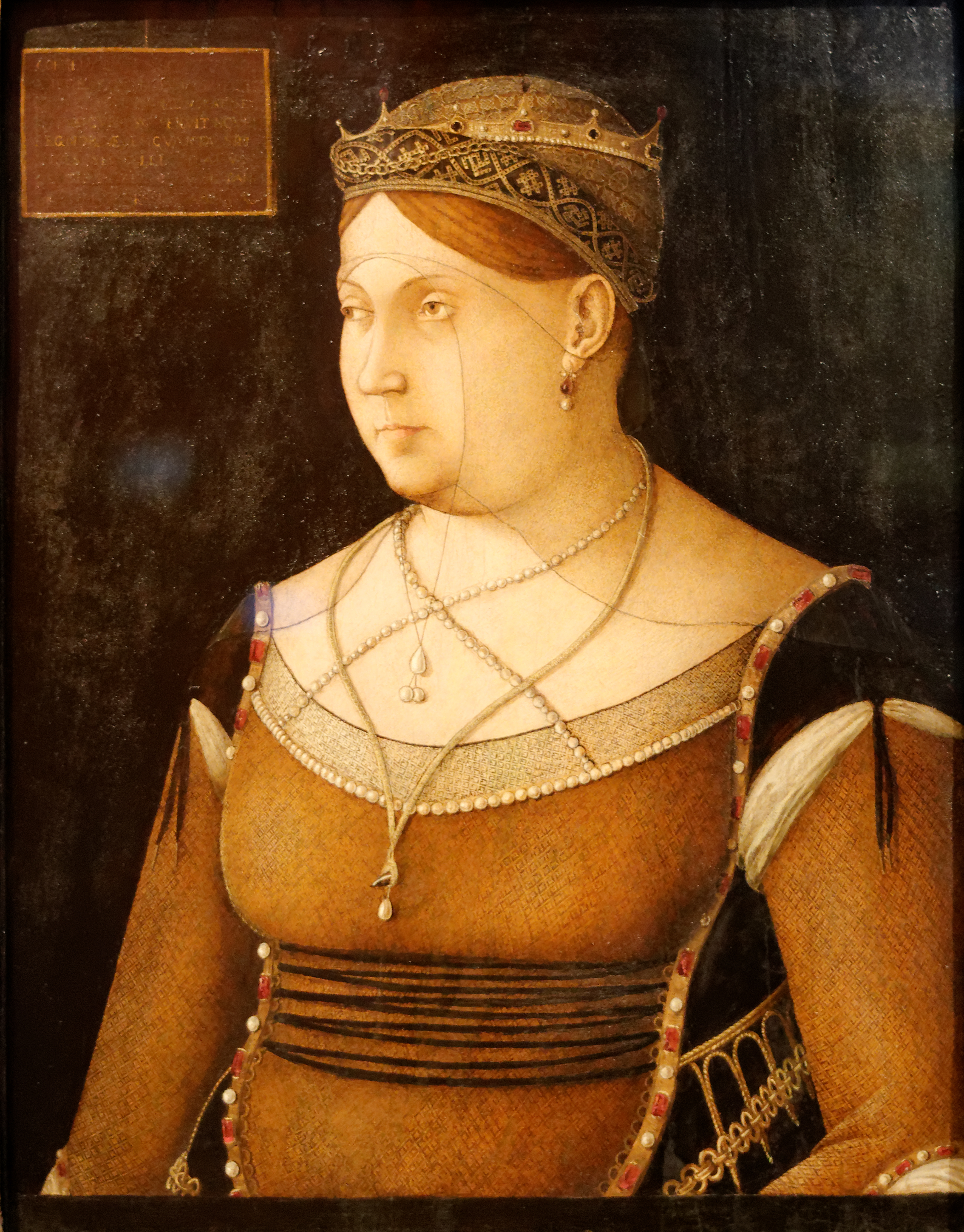 Portrait de Catherine Cornaro reine de Chypre, Gentile Bellini. Musée des beaux arts de Budapest Inv.Nr 101. Don de János László Pyrker, 1836